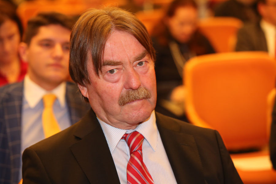 Univ. Prof. DDr. Dieter Stiefel Schumpeter-Gesellschaft Wirtschaftsuniversität Wien Abteilung Sozioökonomie Welthandelsplatz 1 1020 Wien